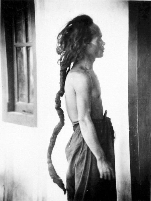 Negatief. Lichtbeeld ; 20279.. Zijdelings portret van een Karo-priester met een onontwarbare haarvlecht